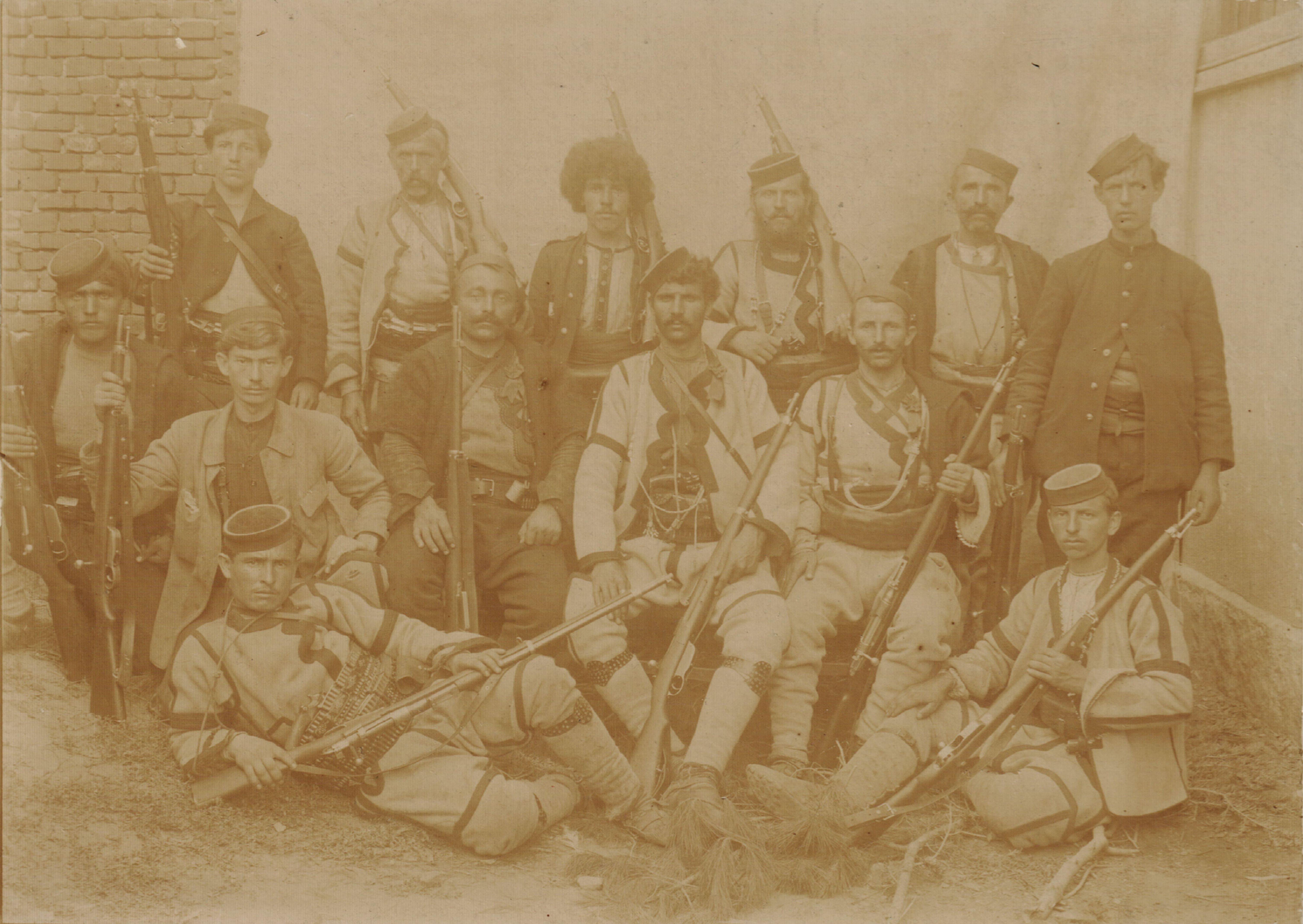 Седнали отляво надясно:Гюрчин Петров, Лазар Цириов, Божин Вълчев.